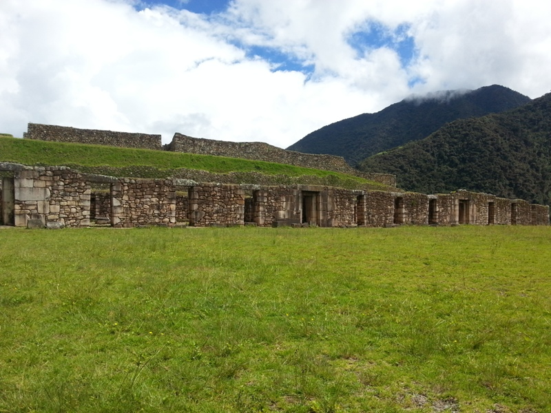 Inka Ruine in der Cusco Region, Peru